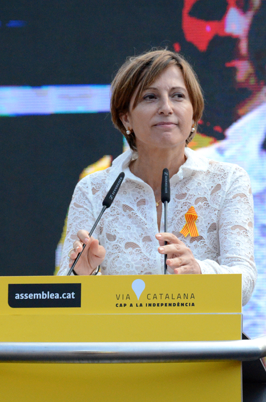 Carme Forcadell. La Via Catalana a Barcelona. Plaça Catalunya.